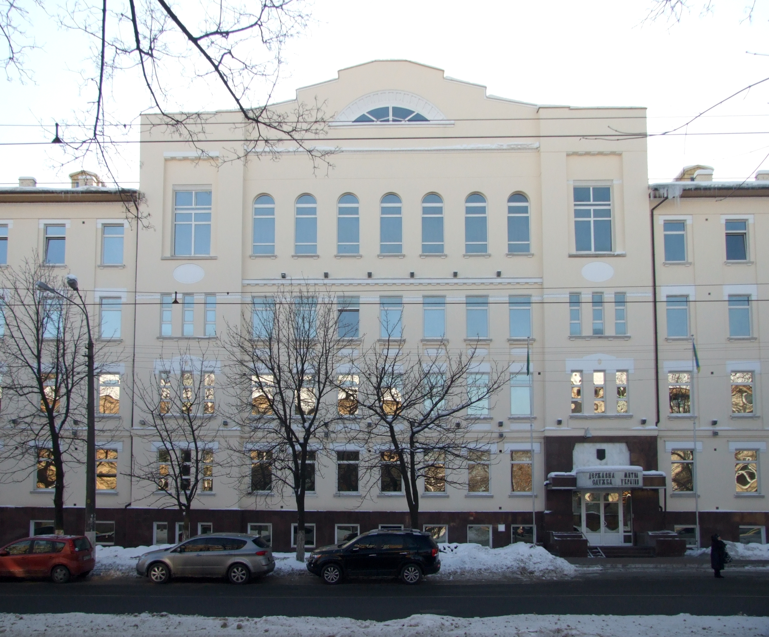 Луцькі казарми, 1911 р. (центральний корпус)